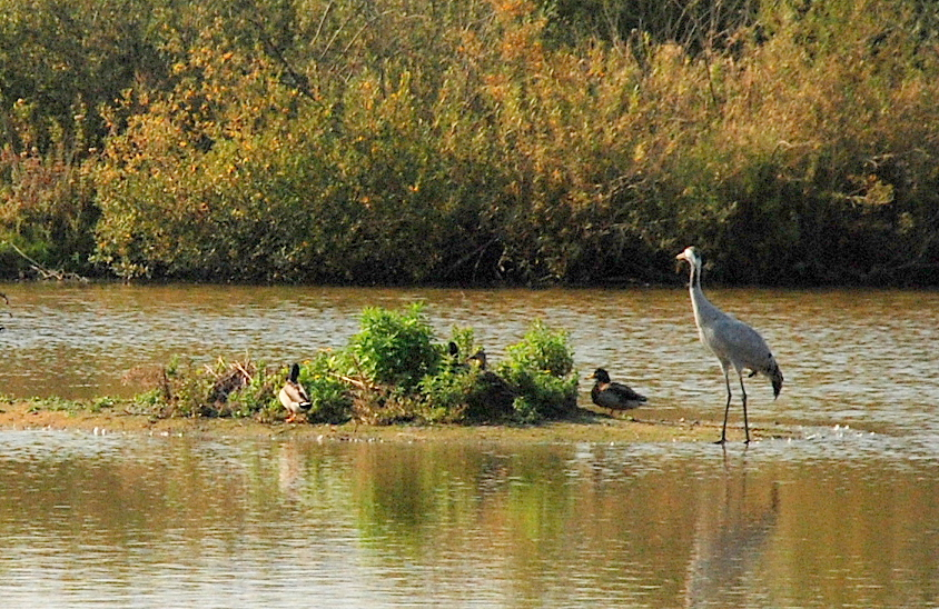 Eenden en een grijze kraanvogel in het ornithologisch park Marquenterre in Picardië, Frankrijk